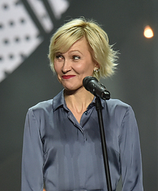 Премия Золотая маска - 2017 года